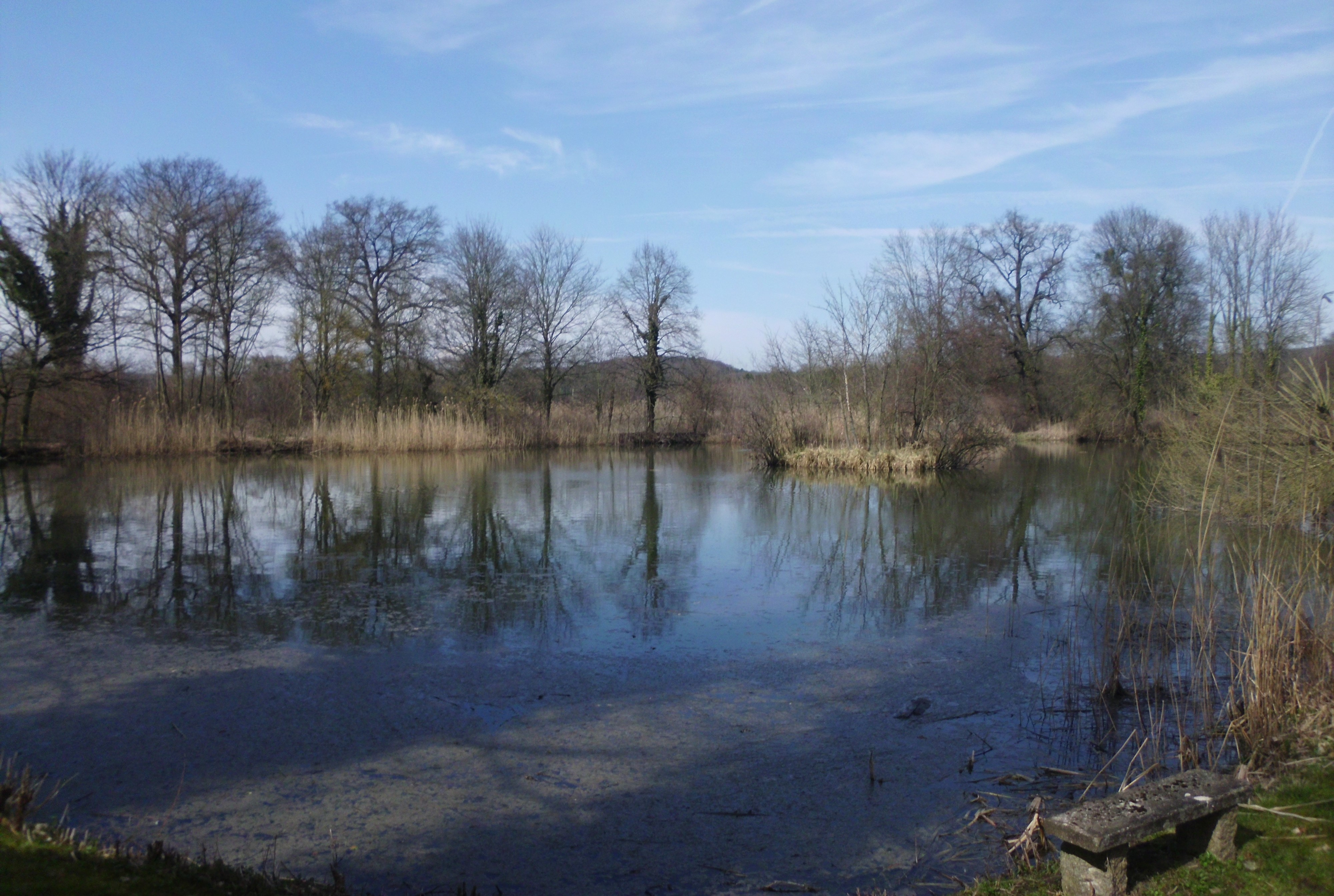 Einer der Derneburger Fischteiche im NSG Mittleres Innerstetal mit Kanstein, Gemeinde Holle, Landkreis Hildesheim